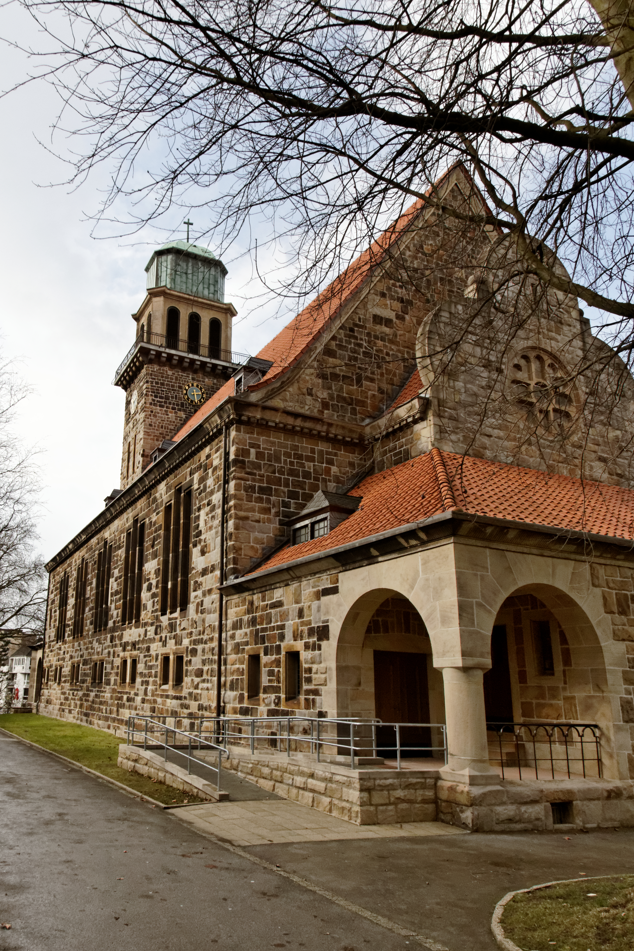 Evangelische Erlöserkirche Hiltrop; Bochum, An der Hiltroper Kirche 2b; Denkmallise Bochum A 273